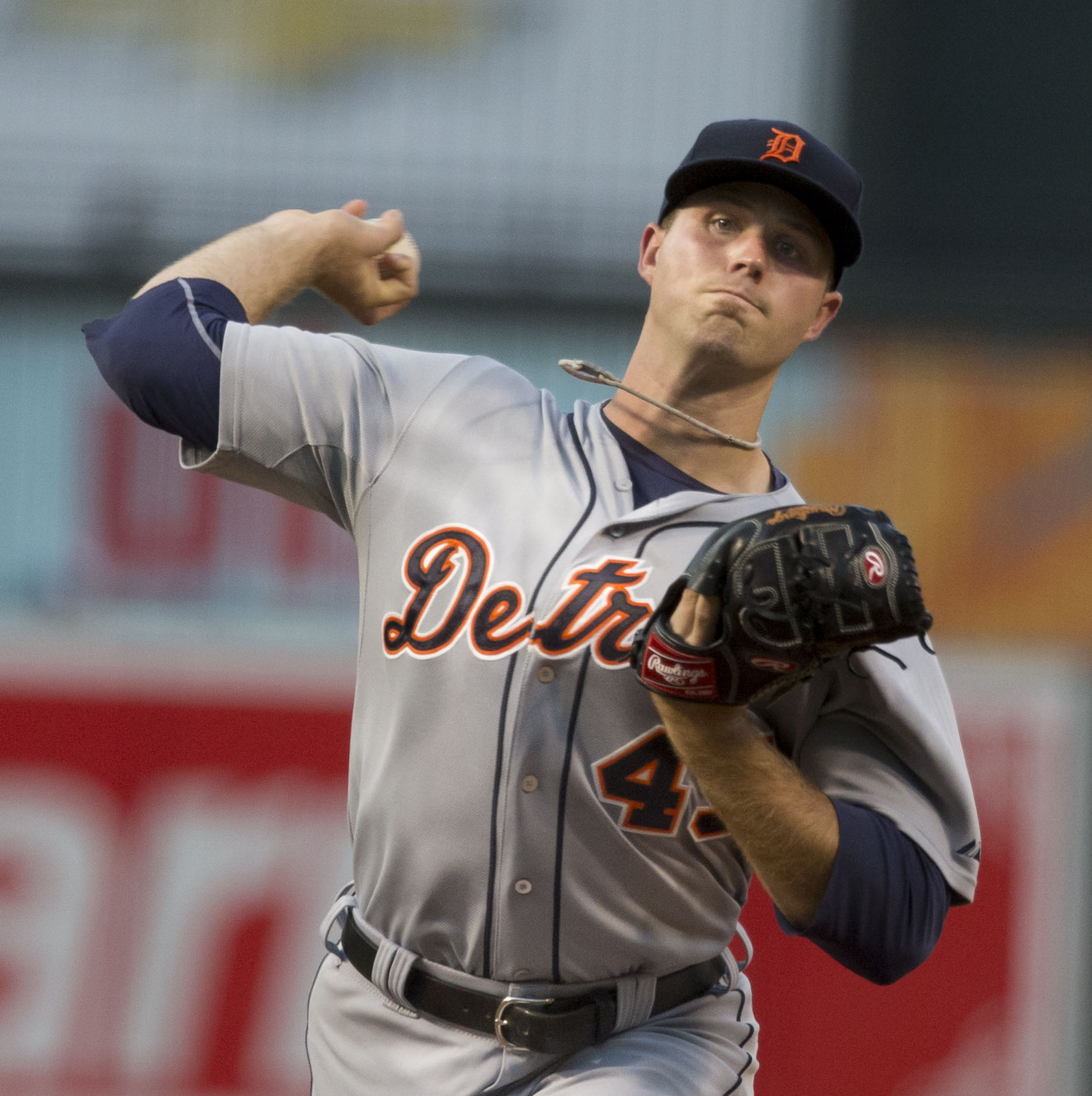 Buck Farmer